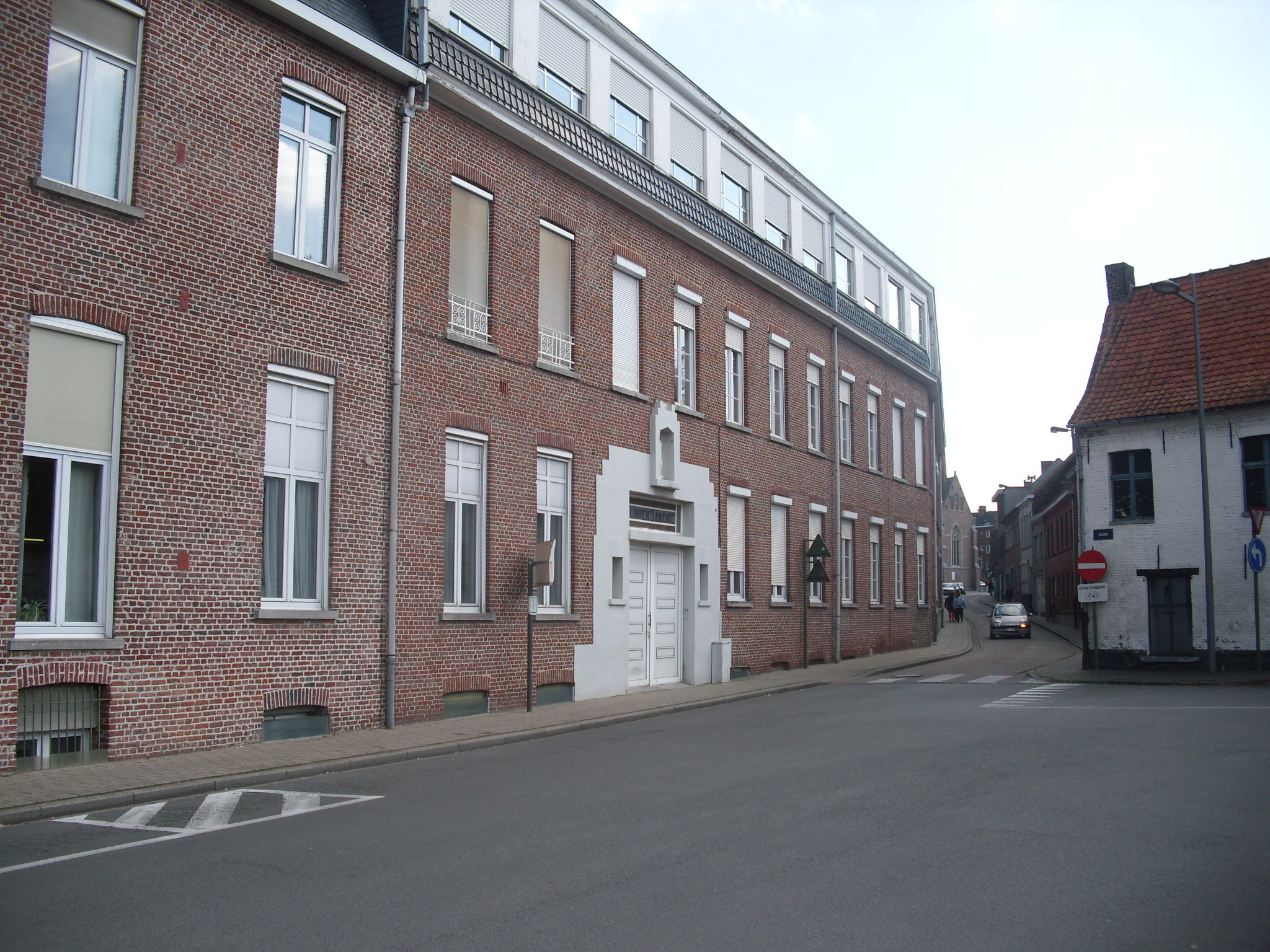 Oude ingang van het voormalig Sint-Andriesziekenhuis - Krommewalstraat - Tielt - West-Vlaanderen - België